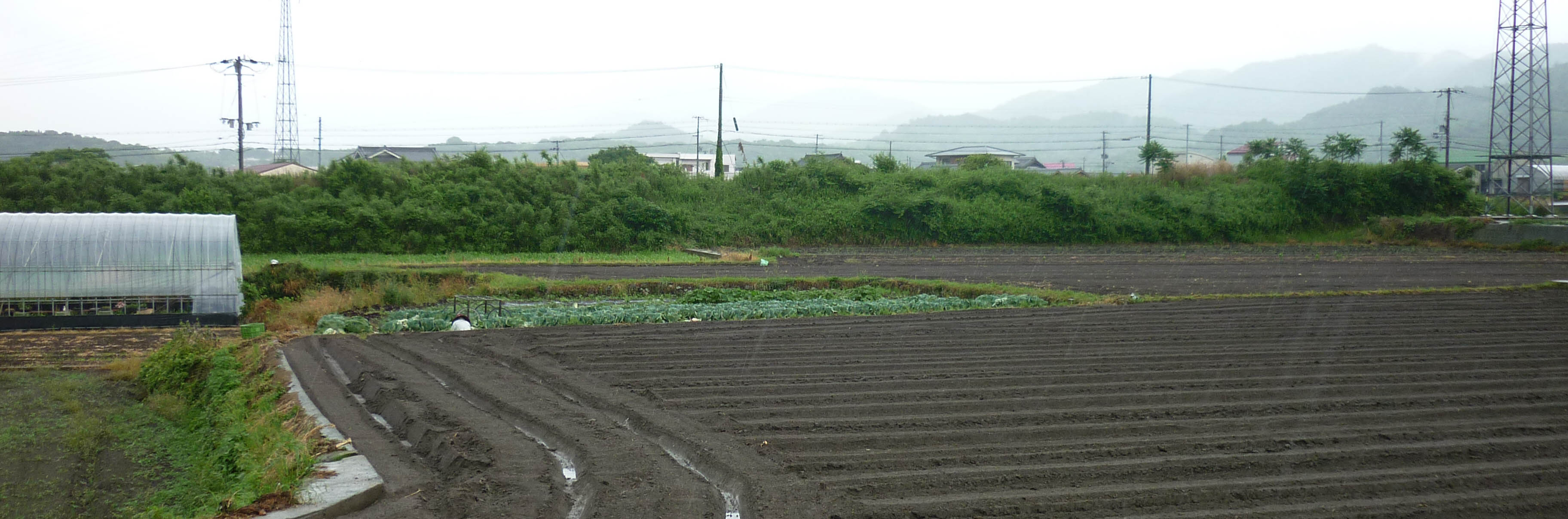 土塁と曲輪跡